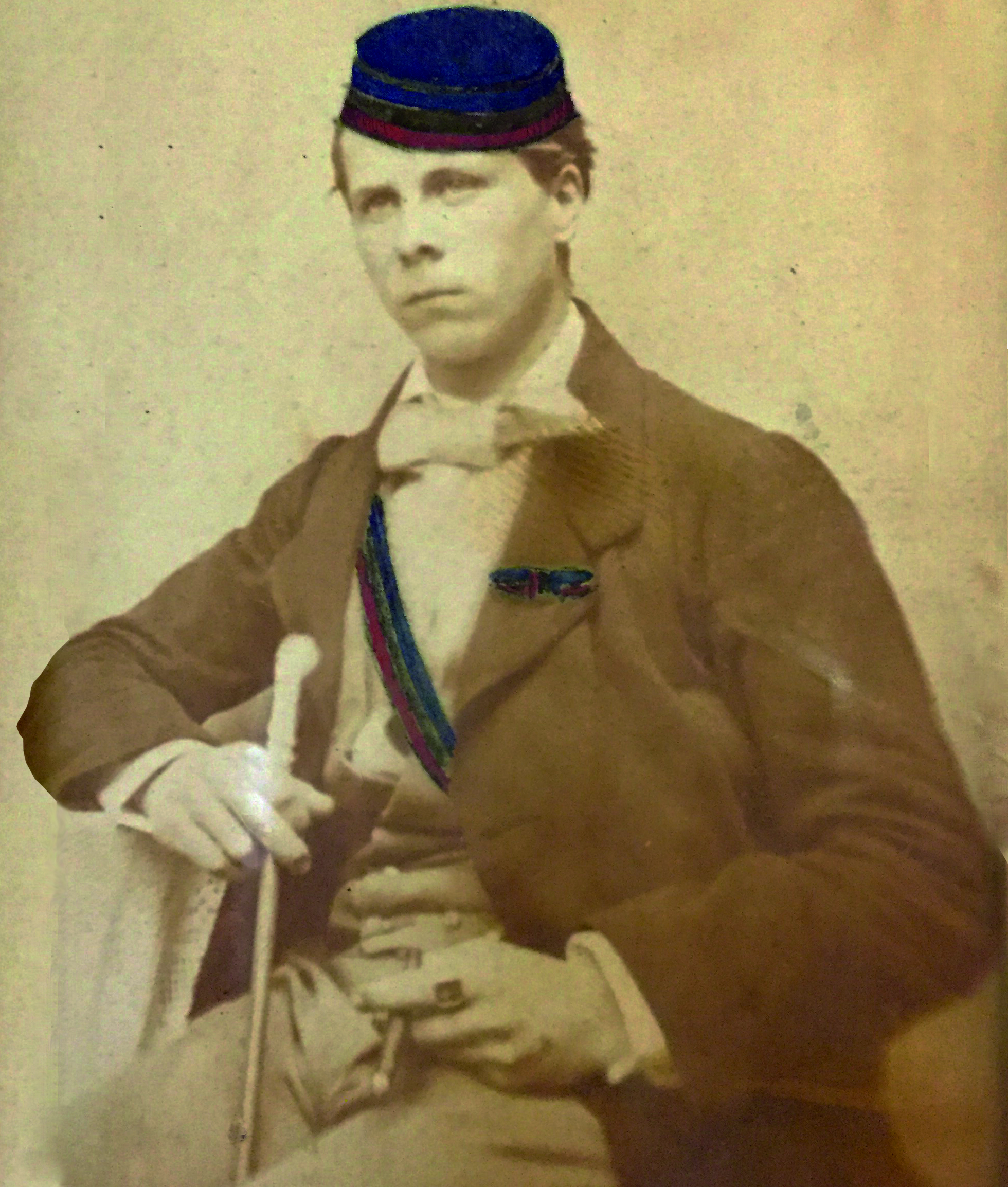 Viktor Ferdinand Kranold als Angehöriger des Corps Lusatia Leipzig